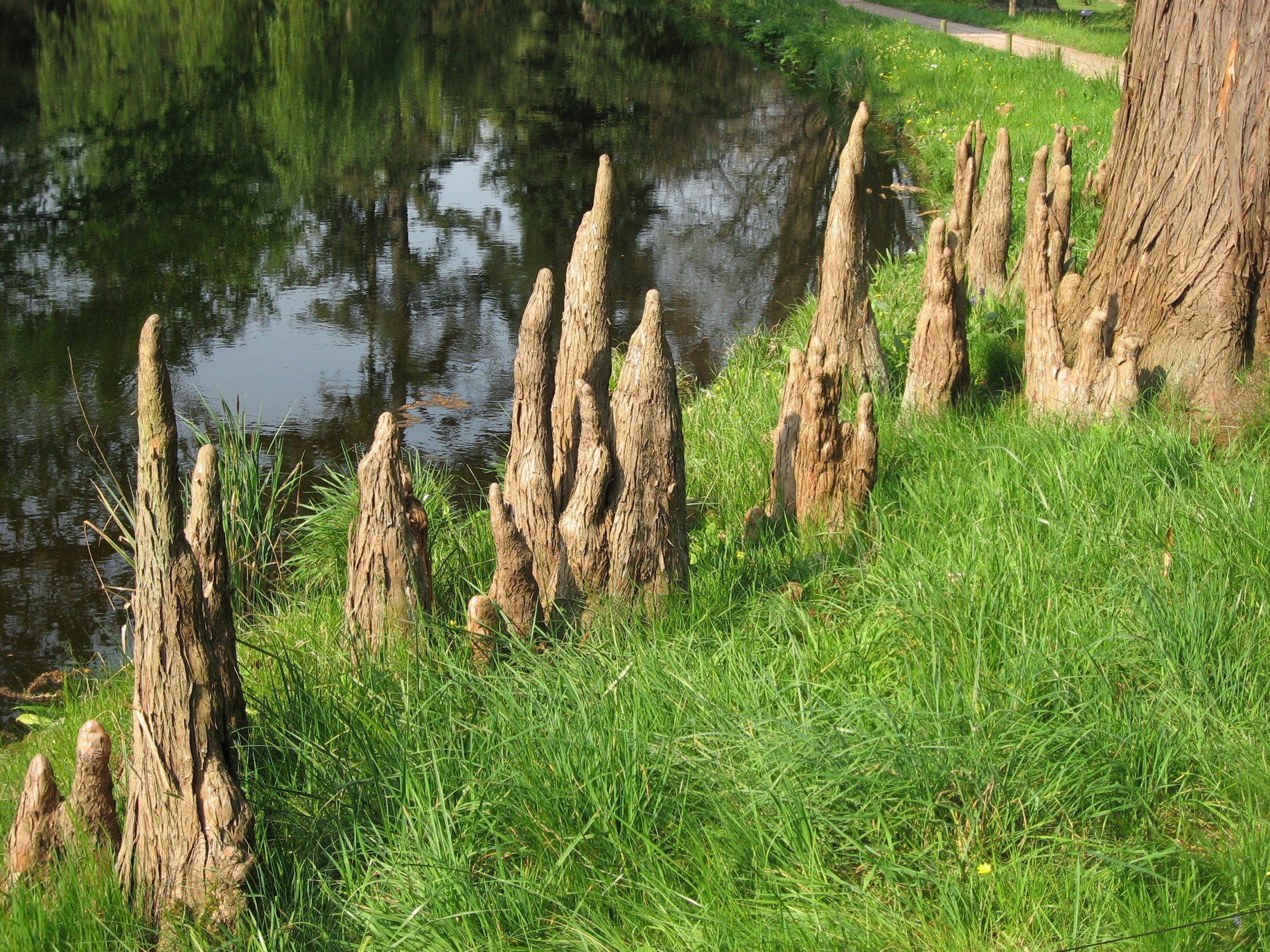 Racine aérienne (Pneumatophore) de Taxodium ascendens 'Nutans' (Cyprès des étangs) in Arboretum de la Vallée-aux-Loups Map: 48° 46' 22" N 2° 16' 5" E